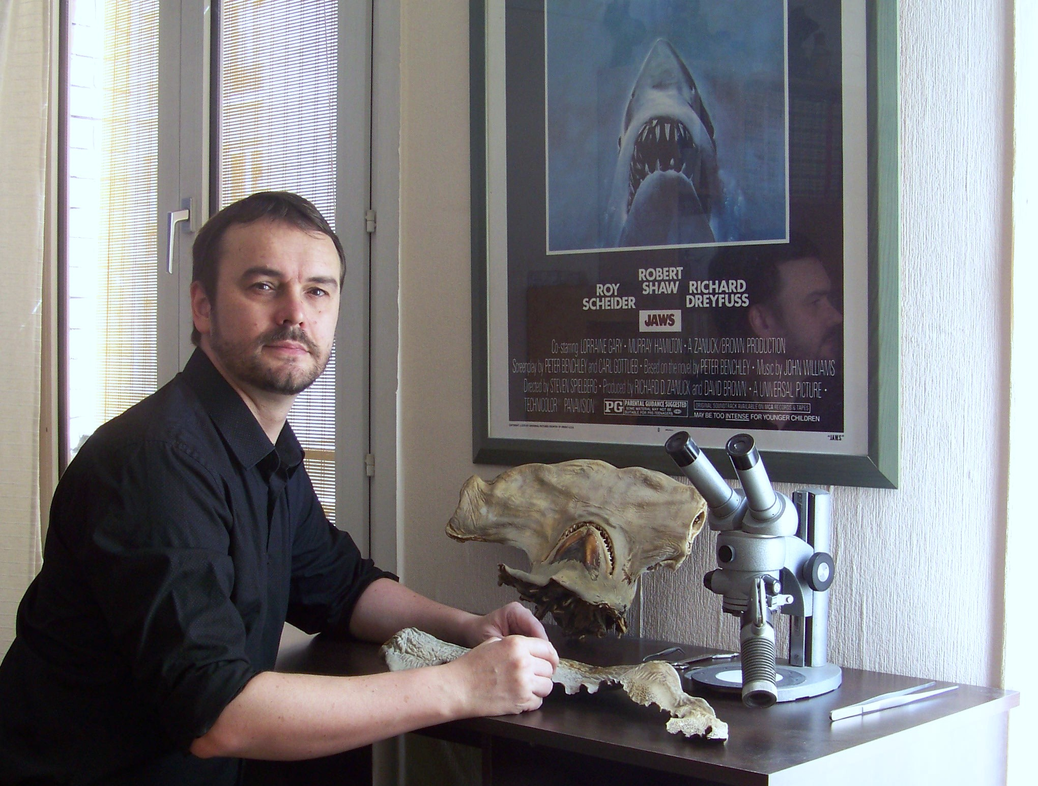 Pascal Deynat étudiant le revêtement cutané d'un requin griset